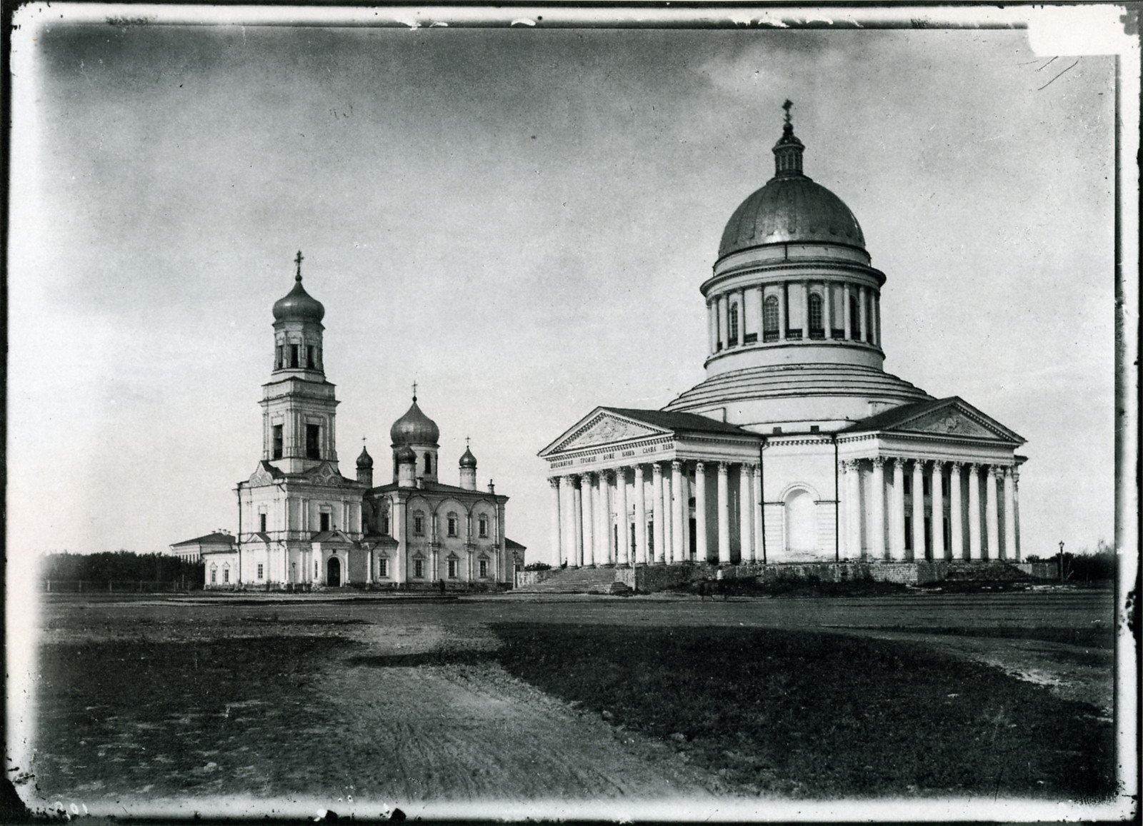 Кафедральный собор в Симбирске. Город имел два кафедральных храма - Никольский зимний и Троицкий летний, неотапливаемый, которые считались единым кафедральным собором